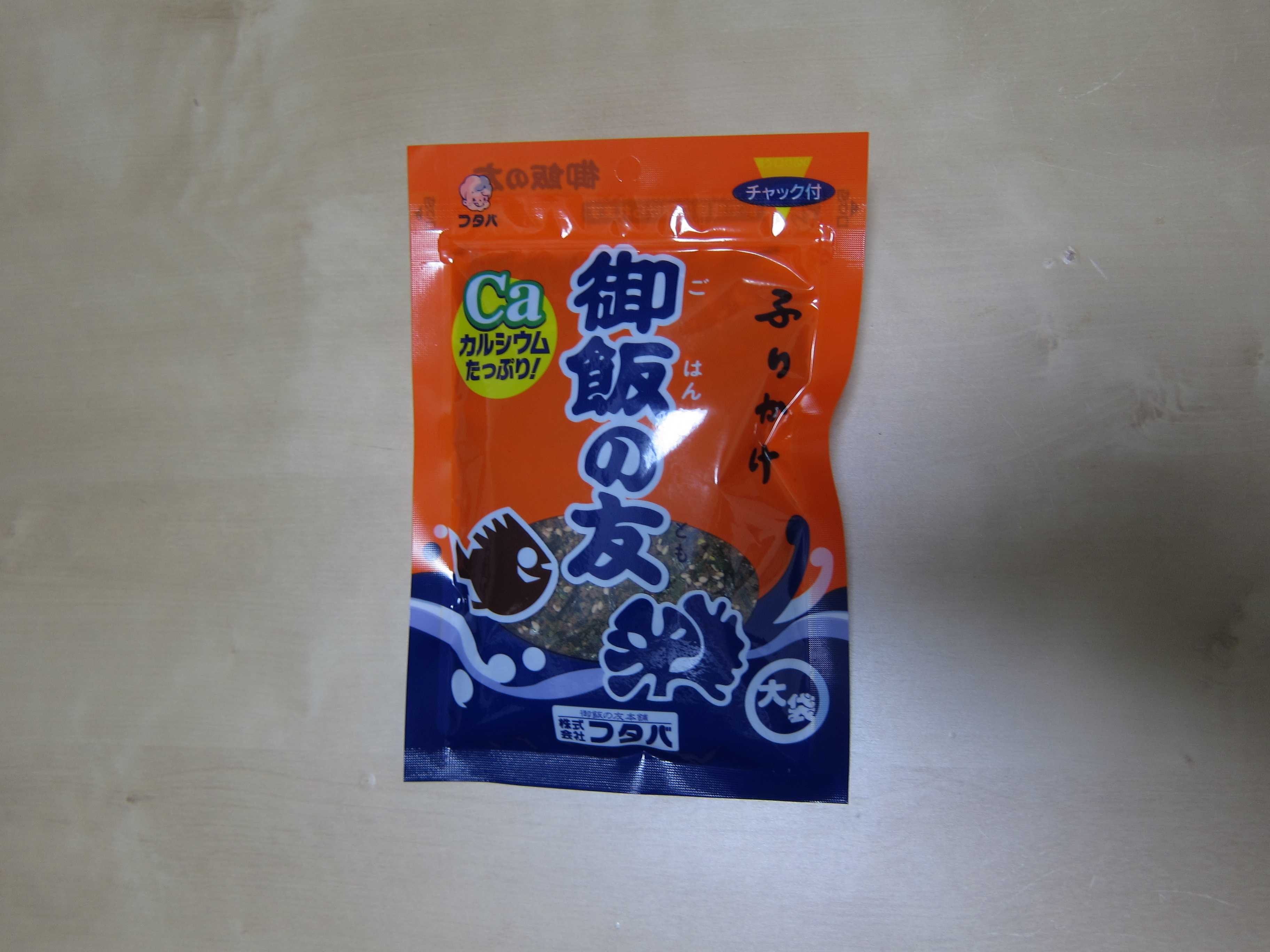 日本最初のふりかけ「ご飯の友」